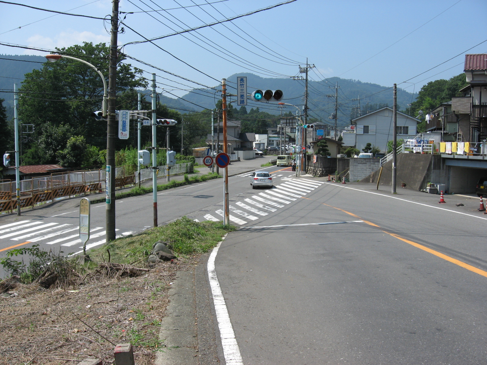 神奈川県道513号線（手前）と国道412号（前方）